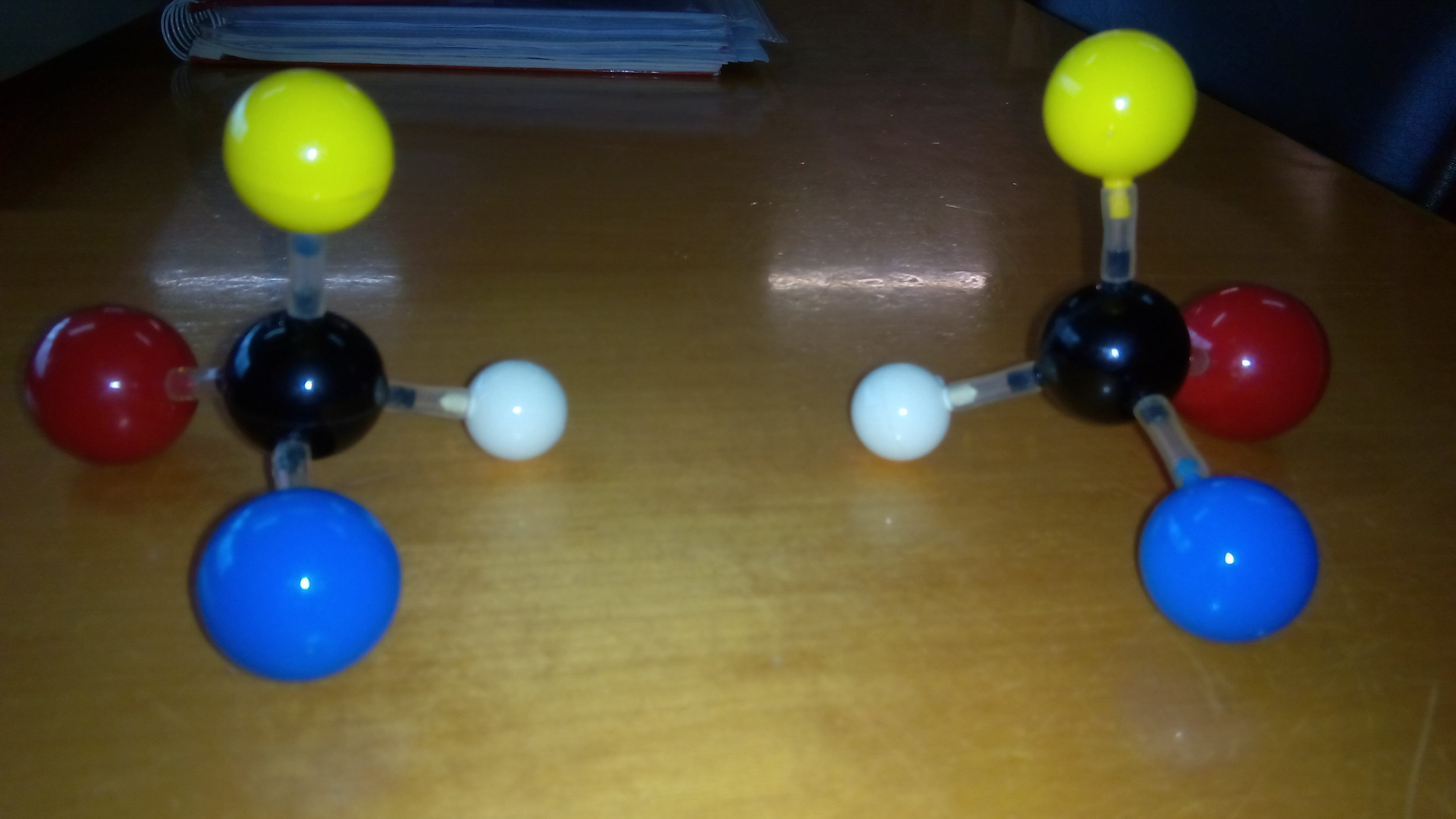 Carbonos asimétricos, unidos a cuatro radicales direrentes, formando moléculas que son imágenes especulares